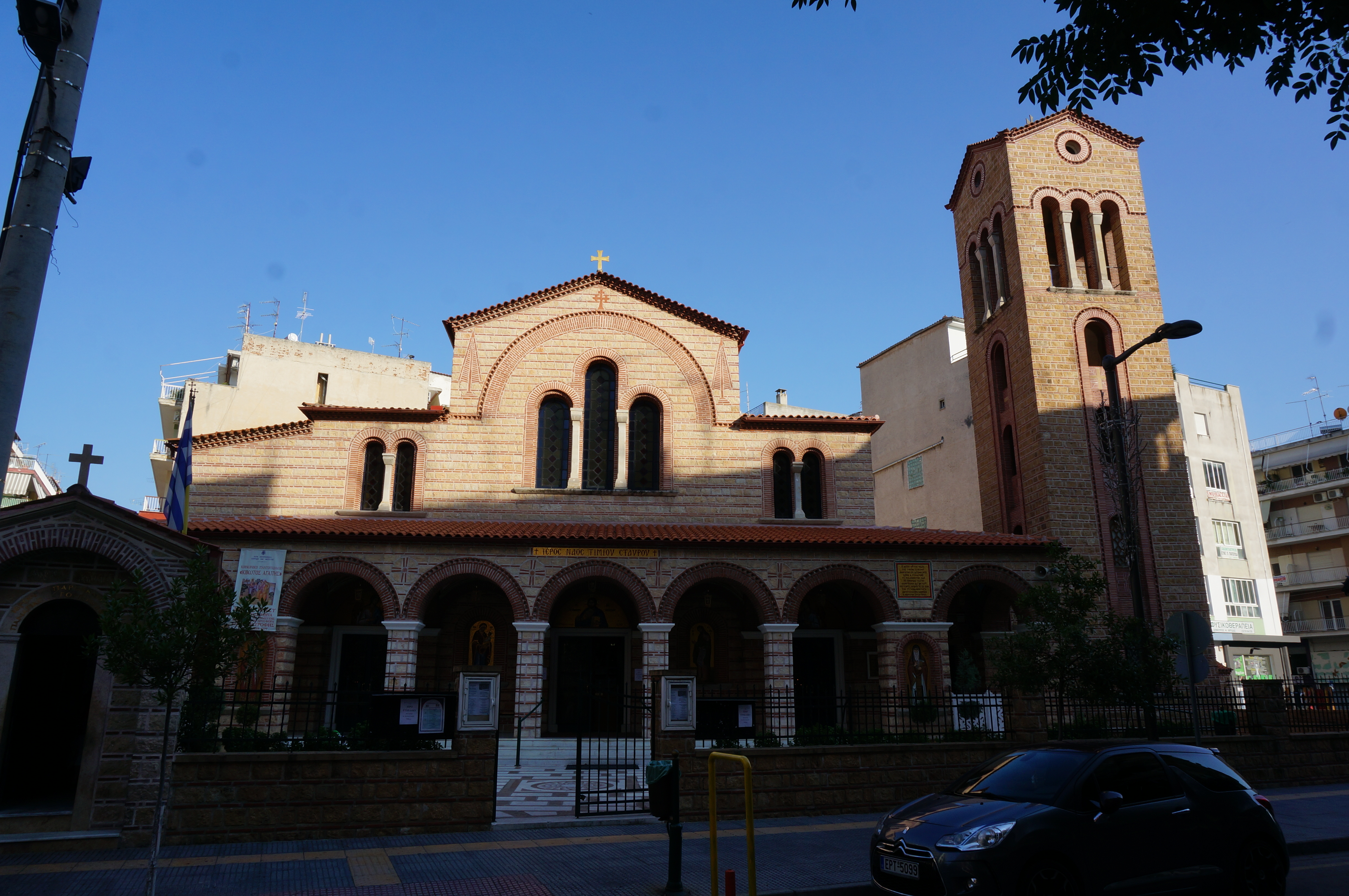 à Serres.